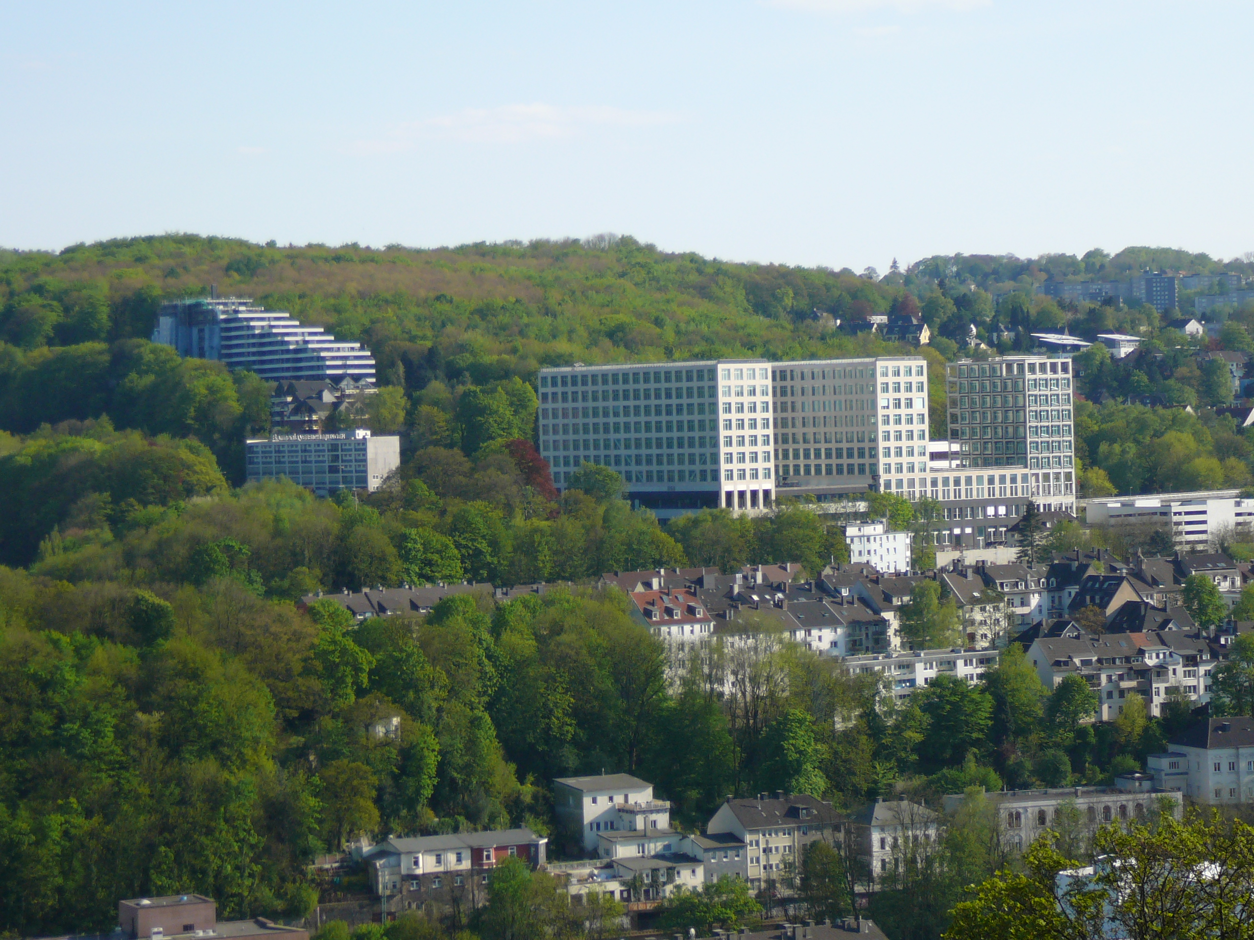 Hardt-Anlagen, Wuppertal